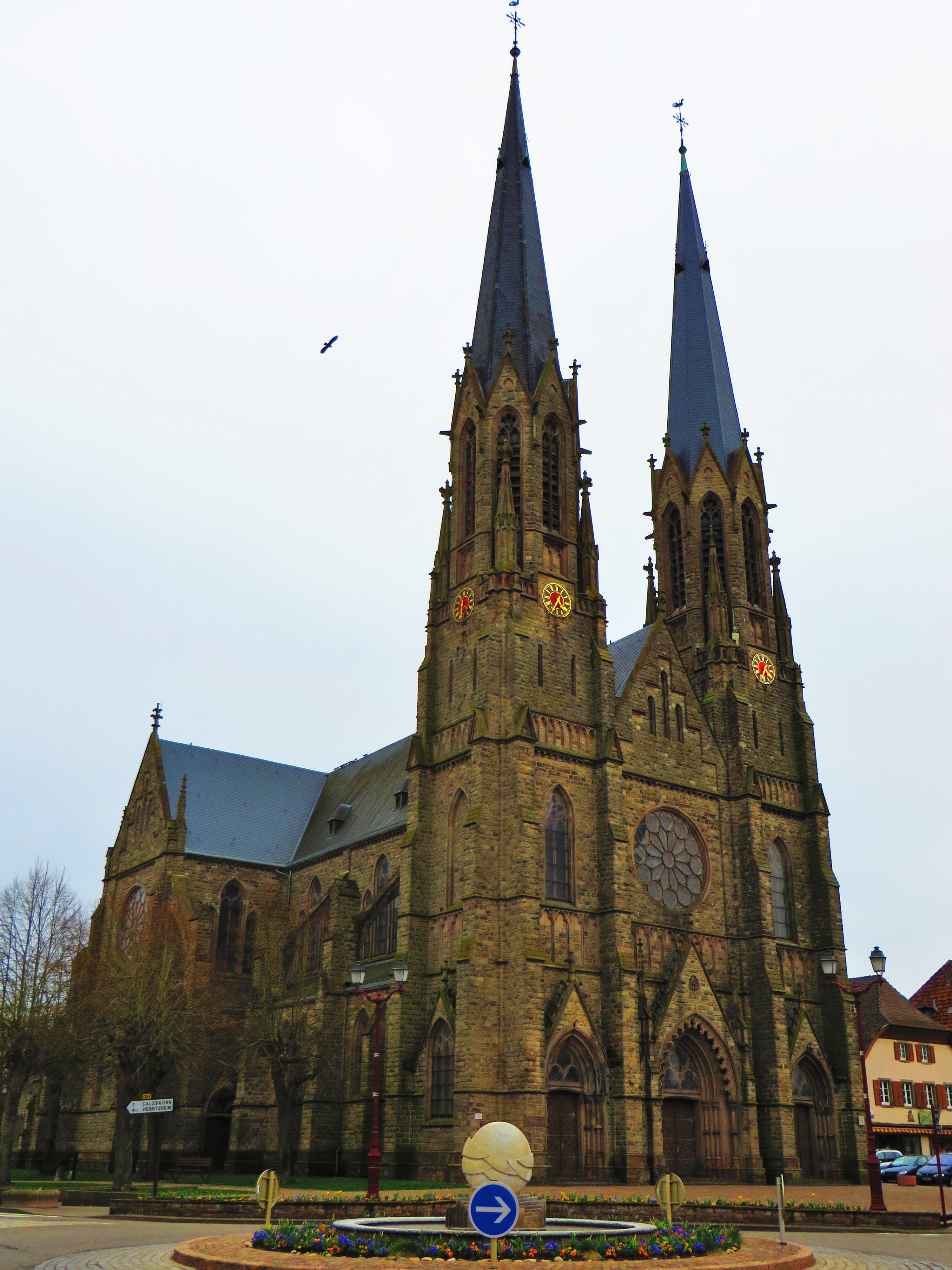 Eglise Sarralbe moselle